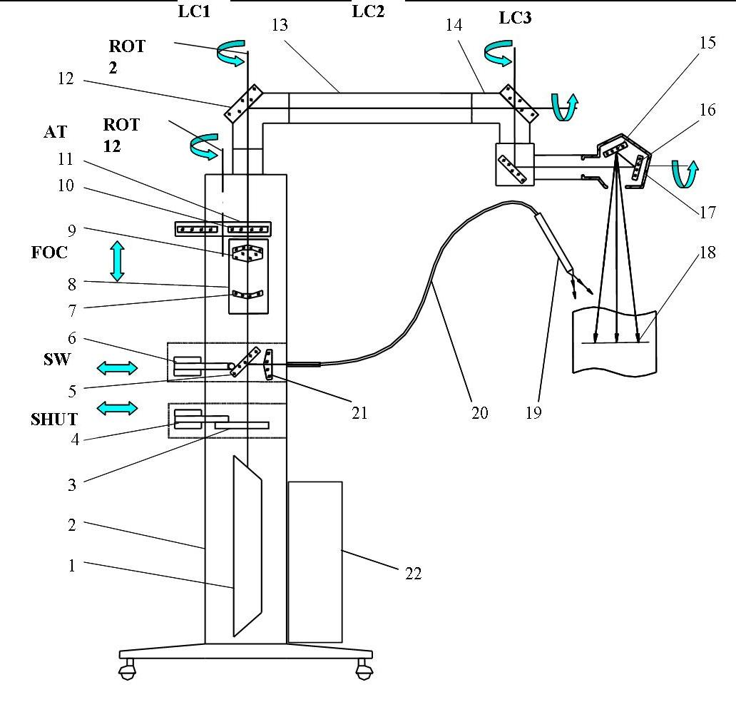 Схема лазерного терапевтичного апарата сканера медичного СМ-1 виробництва ТОВ "Ніжинські лабораторії скануючих пристроїв". рисунок для статті Сканер медичний СМ-1. Nizh Labs of Scannig - 59